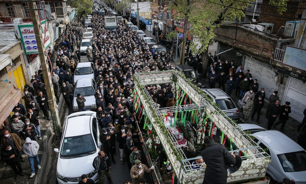 تشییع جنازه سردار حسین اسداللهی به رغم وجود هشدارهای کرونایی